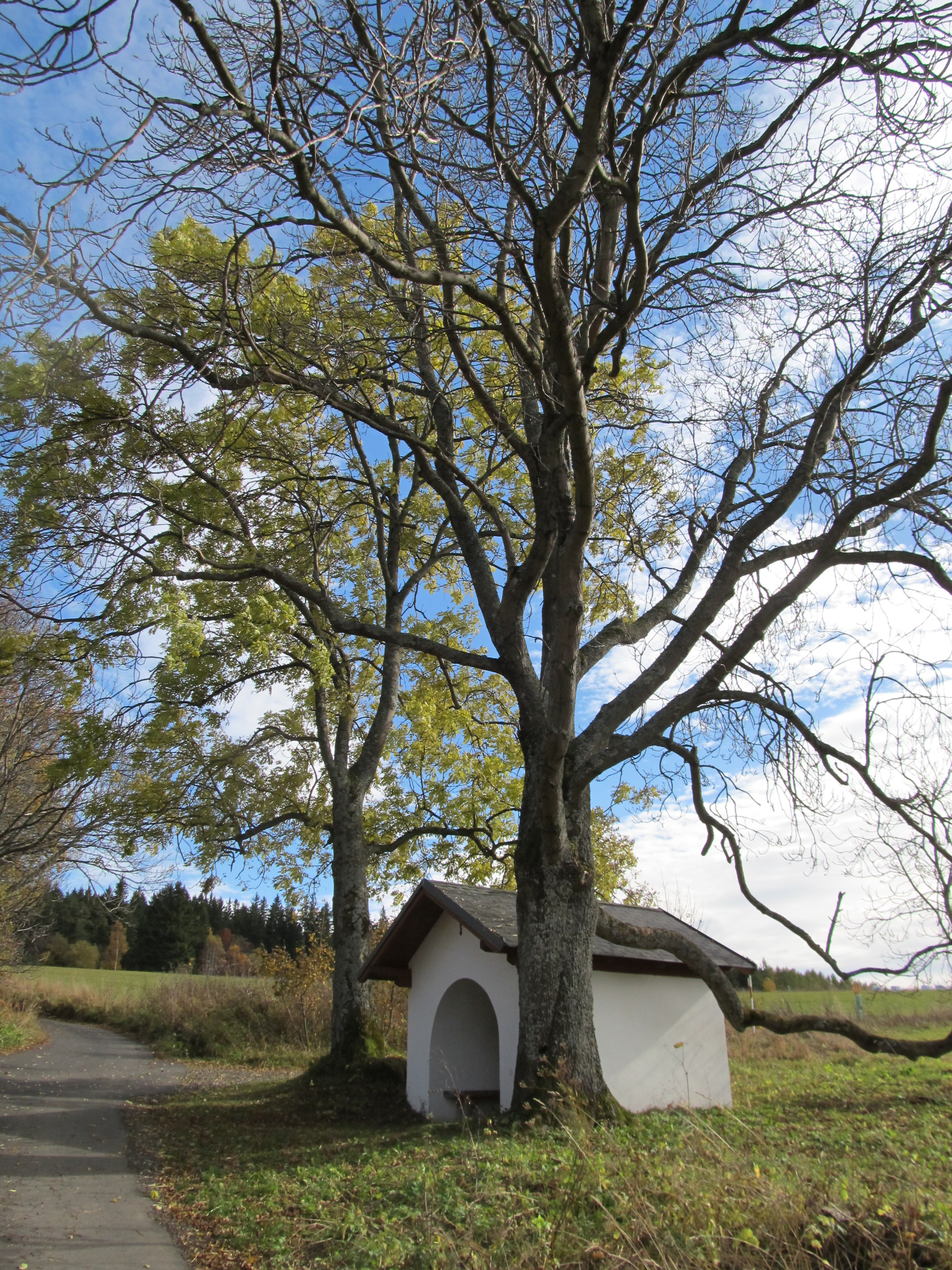 Svinná - kaplička